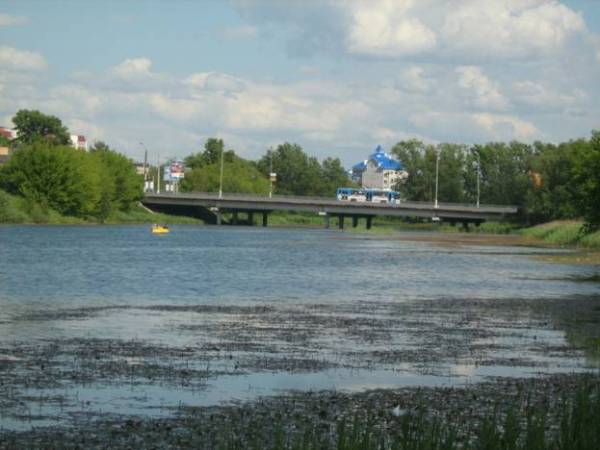 Lazur river, Tver, Russia